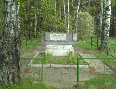 памятник воинам погибшим в годы ВОВ в деревне Гута Рогачёвского раона Беларусь